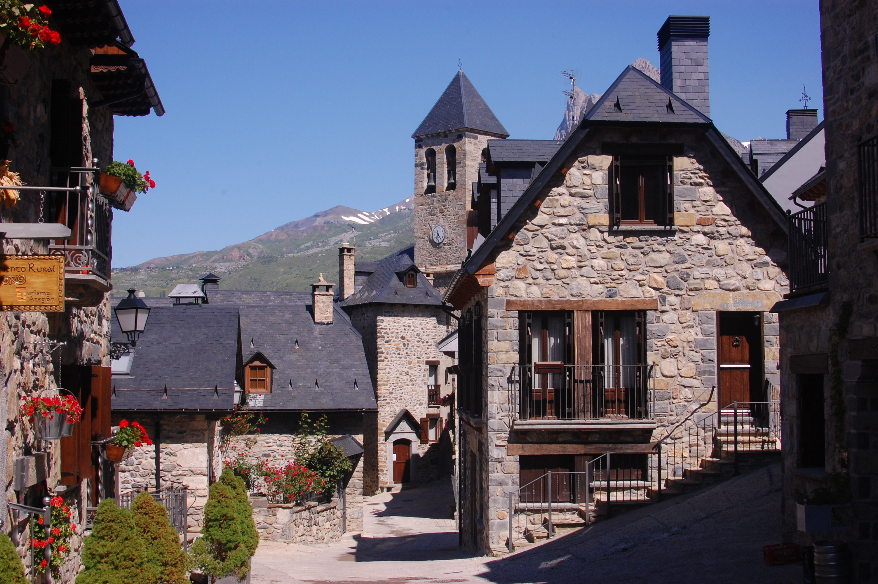 Aragonés: Carrera Mayor, Lanuza